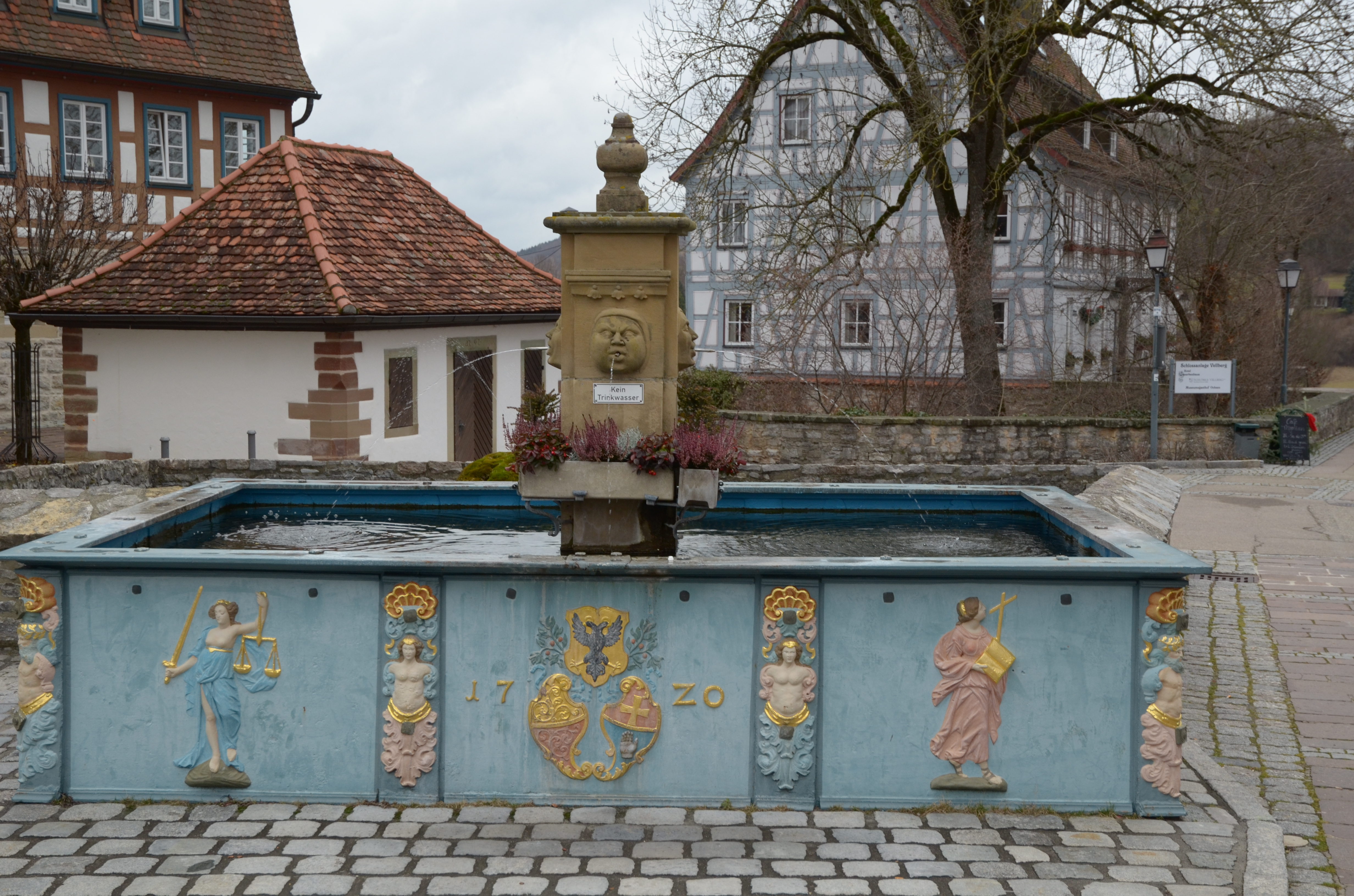 Brunnen im Städtle in Vellberg